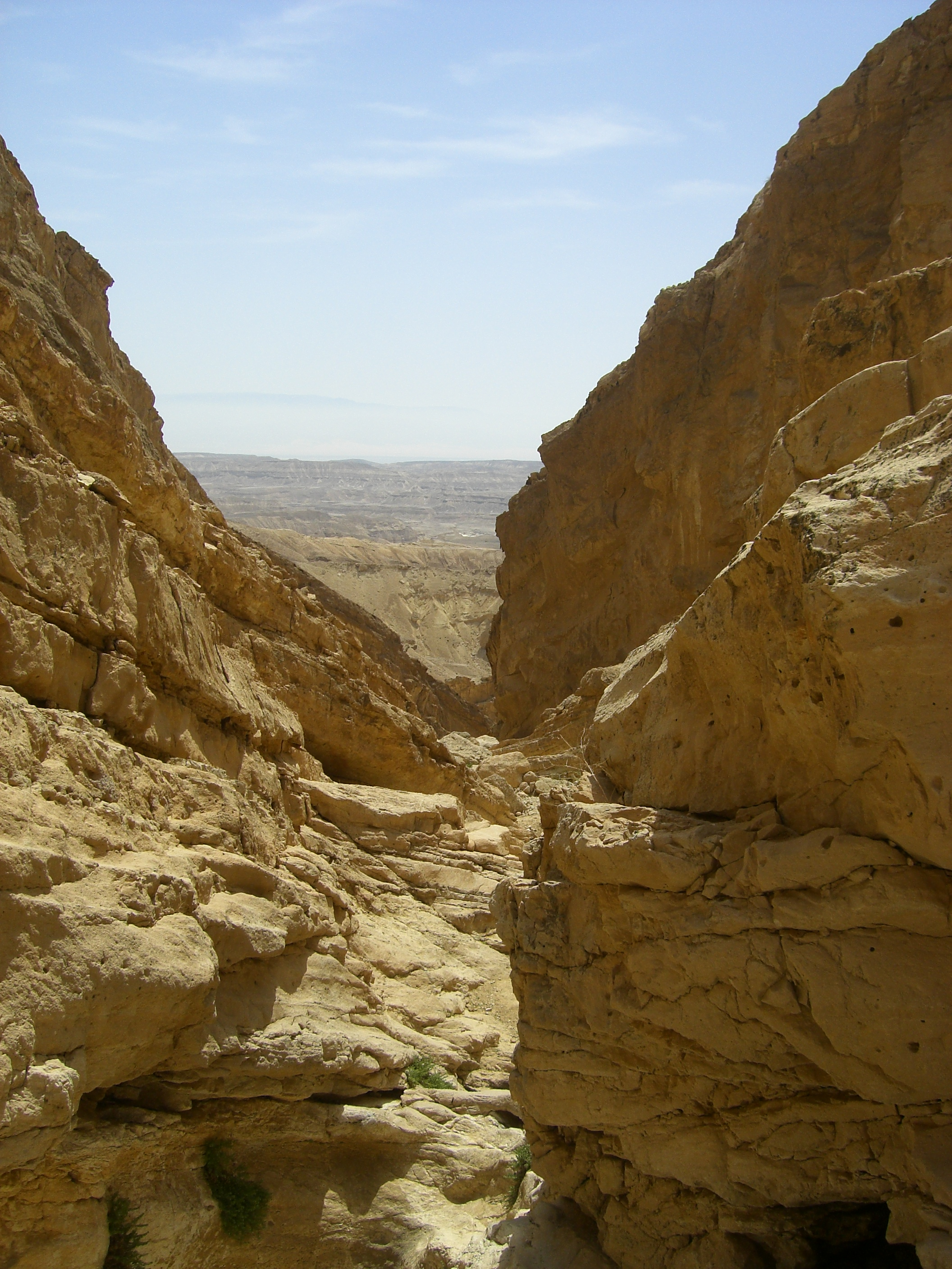 Wadi Akrabim, Negev Desert, Israel